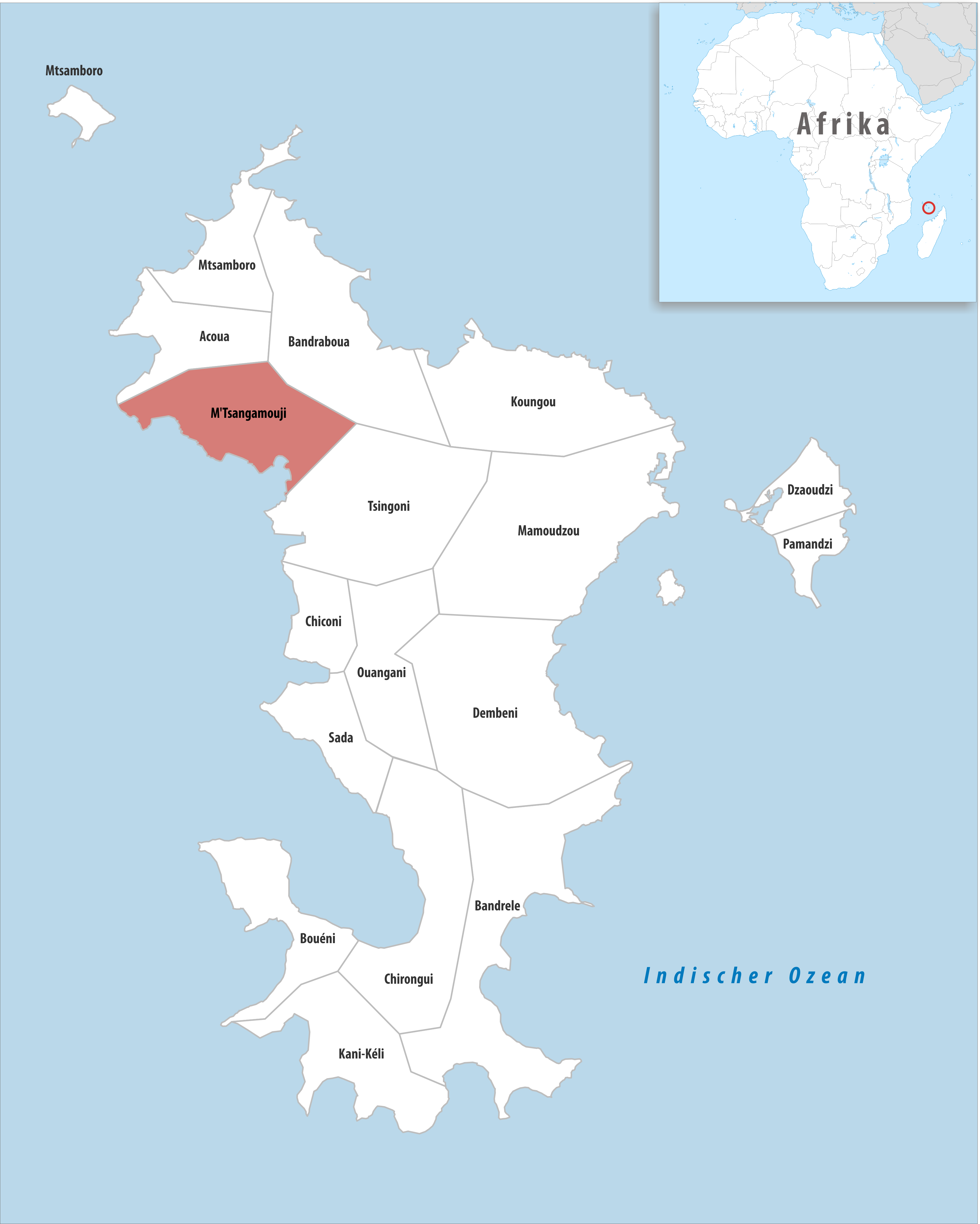 Lage der Gemeinde M'Tsangamouji